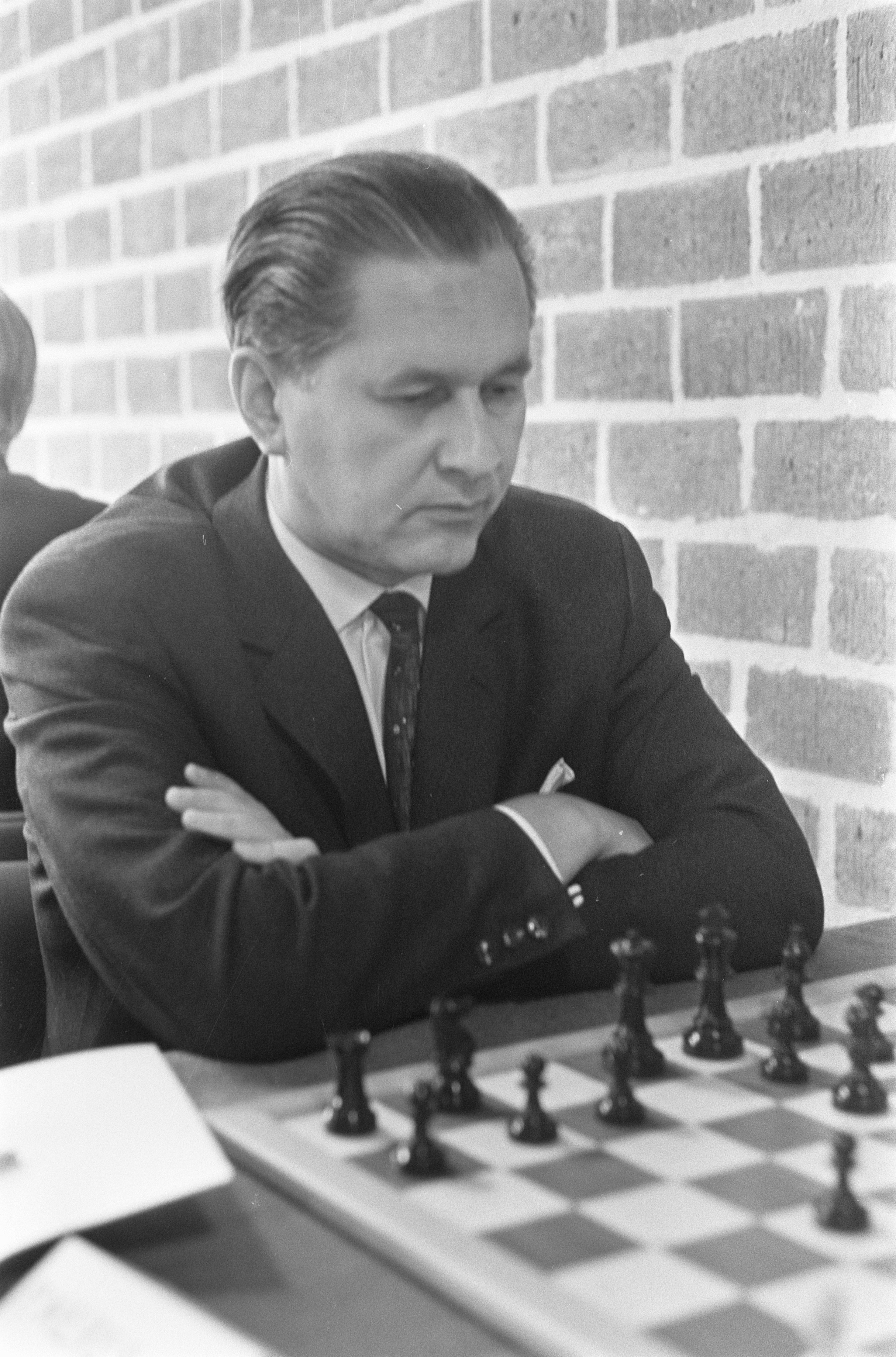 Collectie / Archief : Fotocollectie Anefo Reportage / Serie : [ onbekend ] Beschrijving : Hoogoven Schaaktoernooi Keres Datum : 14 januari 1969 Trefwoorden : schaken, toernooien Fotograaf : Koch, Eric / Anefo Auteursrechthebbende : Nationaal Archief Materiaalsoort : Negatief (zwart/wit) Nummer archiefinventaris : bekijk toegang 2.24.01.05 Bestanddeelnummer : 922-0145